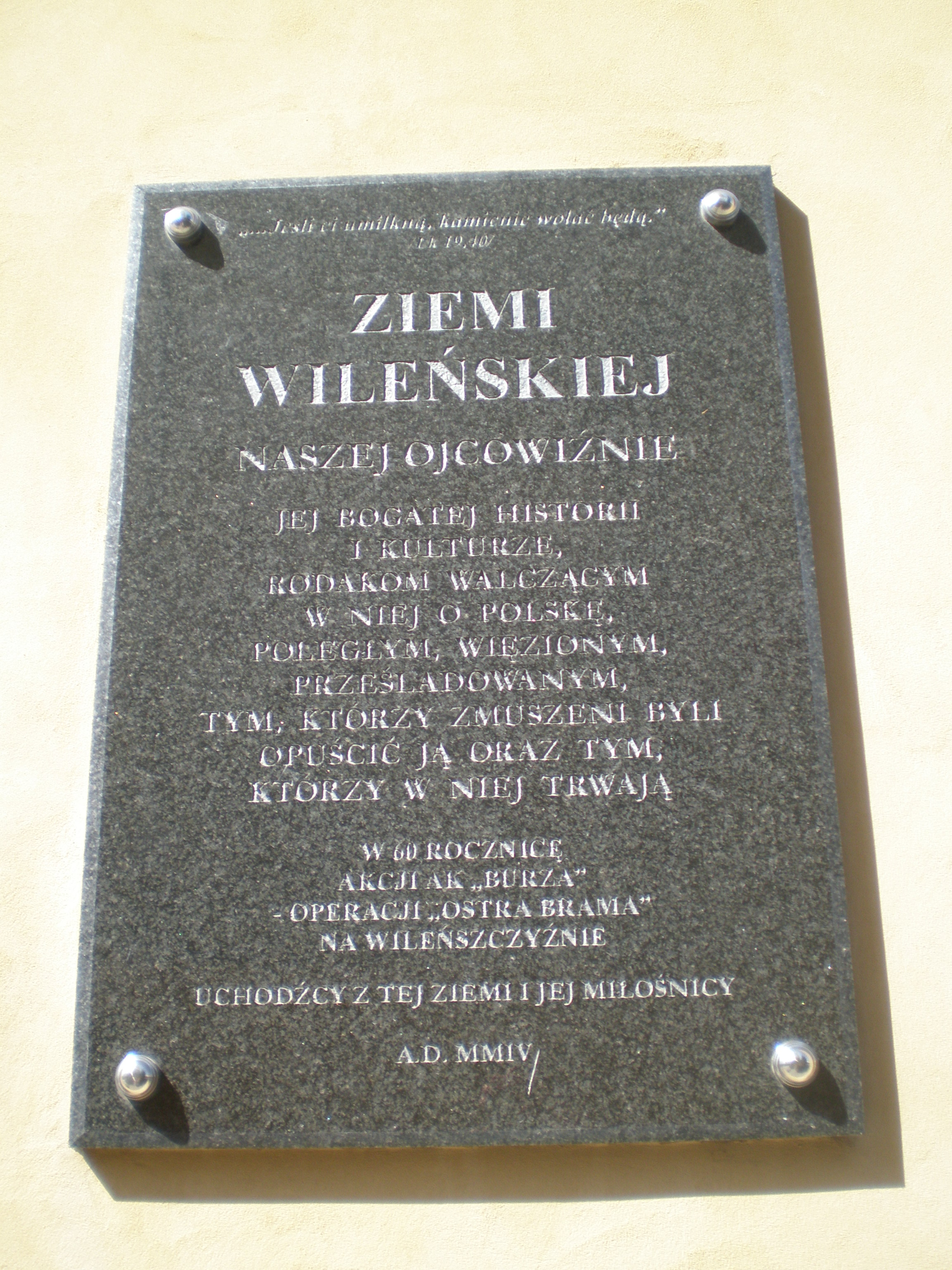 Tablica pamiątkowa, kościół Farny - Rzeszów